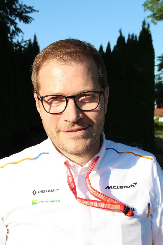 Formula 1 2019 / Schloss Gabelhofen